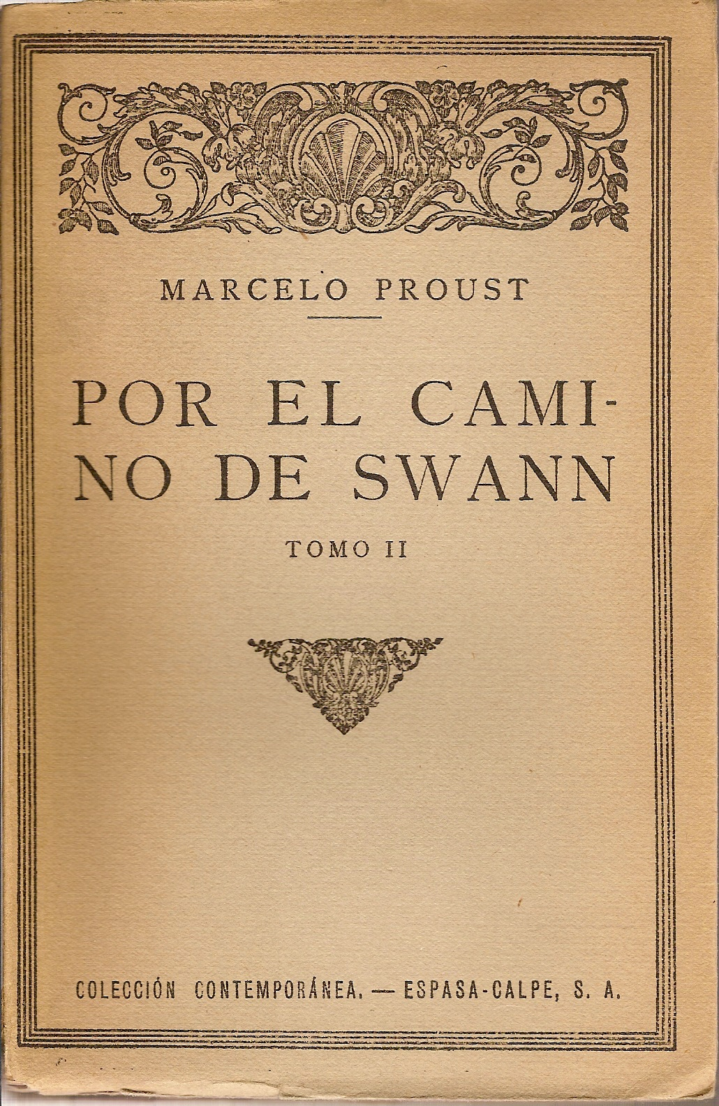 Portada del segundo volumen de Por el camino de Swann, publicado por Espasa-Calpe (Madrid–Barcelona, 1920). Traducción de Pedro Salinas